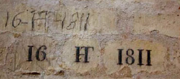 Confortation en carrière réalisée par Louis Étienne Héricart de Thury en 1811.